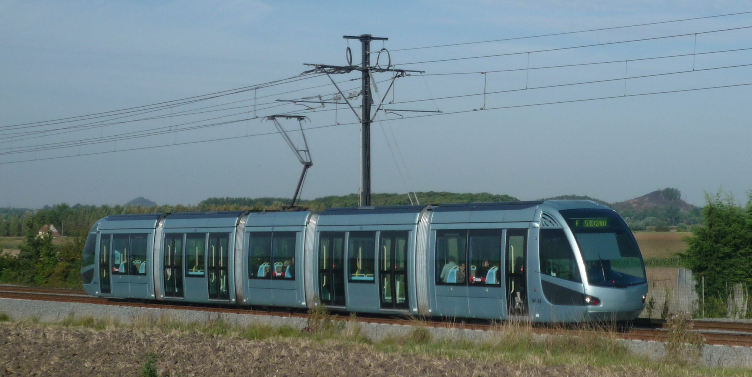 Tramway de Valenciennes, Nord, Nord-Pas-de-Calais, France